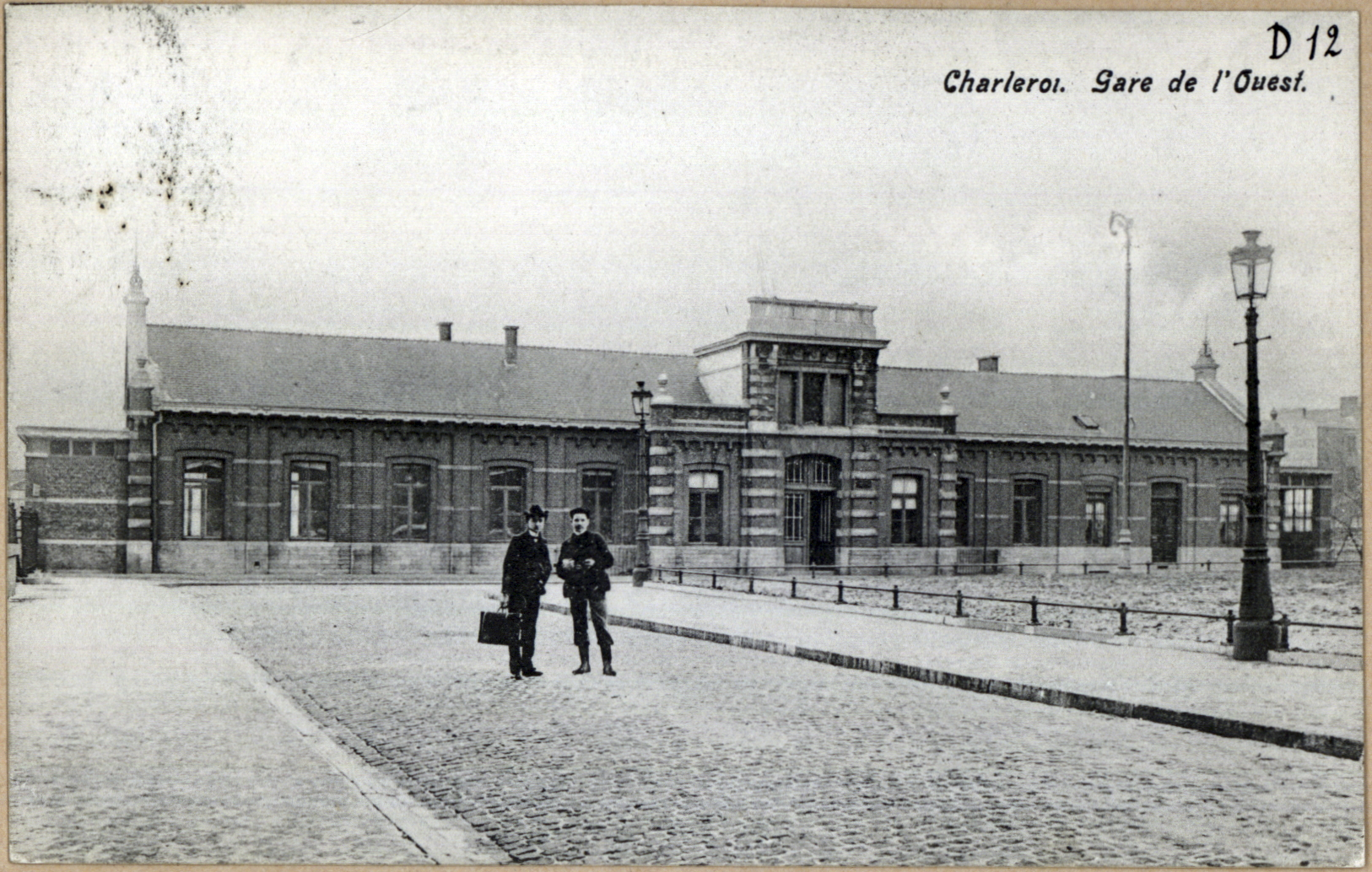 gare de Charleroi-Ouest - Charleroi, Belgique - début XXème siècle